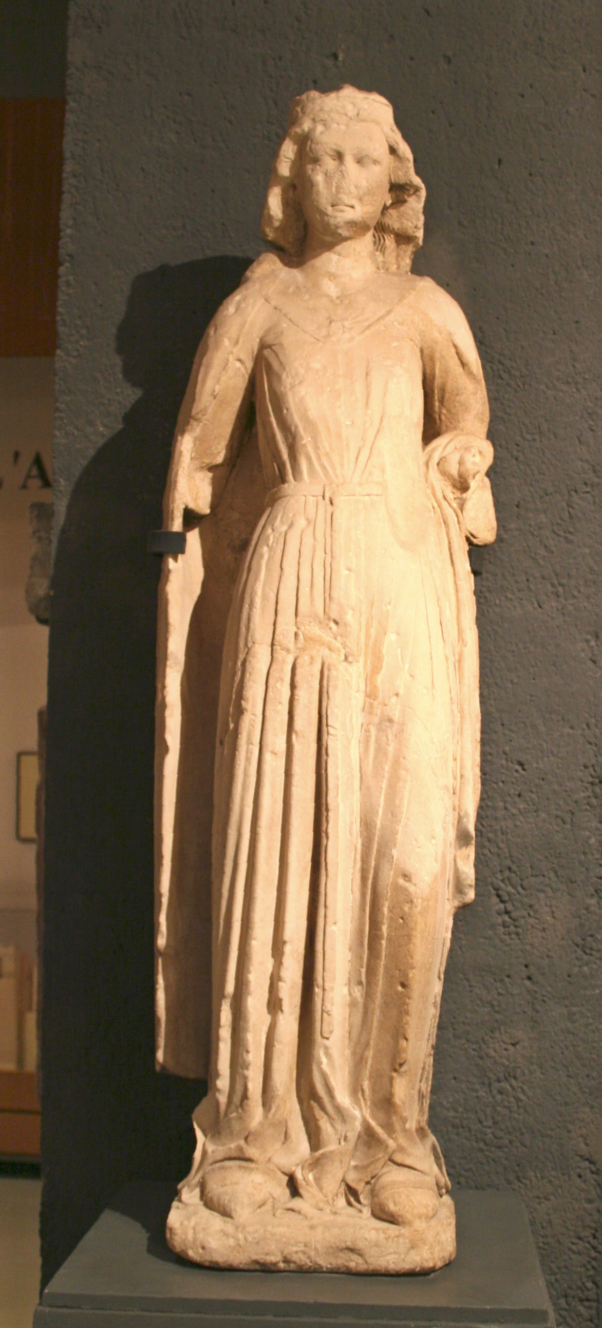 Statue de Béatrice de Provence épouse de Charles Ier d'Anjou (frère du roi de France Saint Louis). Femme couronnée couverte d'un manteau et vétue d'un surcot serré par une ceinture et fermé par une broche. XIIIe siècle. Provient d'une église de Marseille.Musée d'histoire de Marseille au centre bourse.